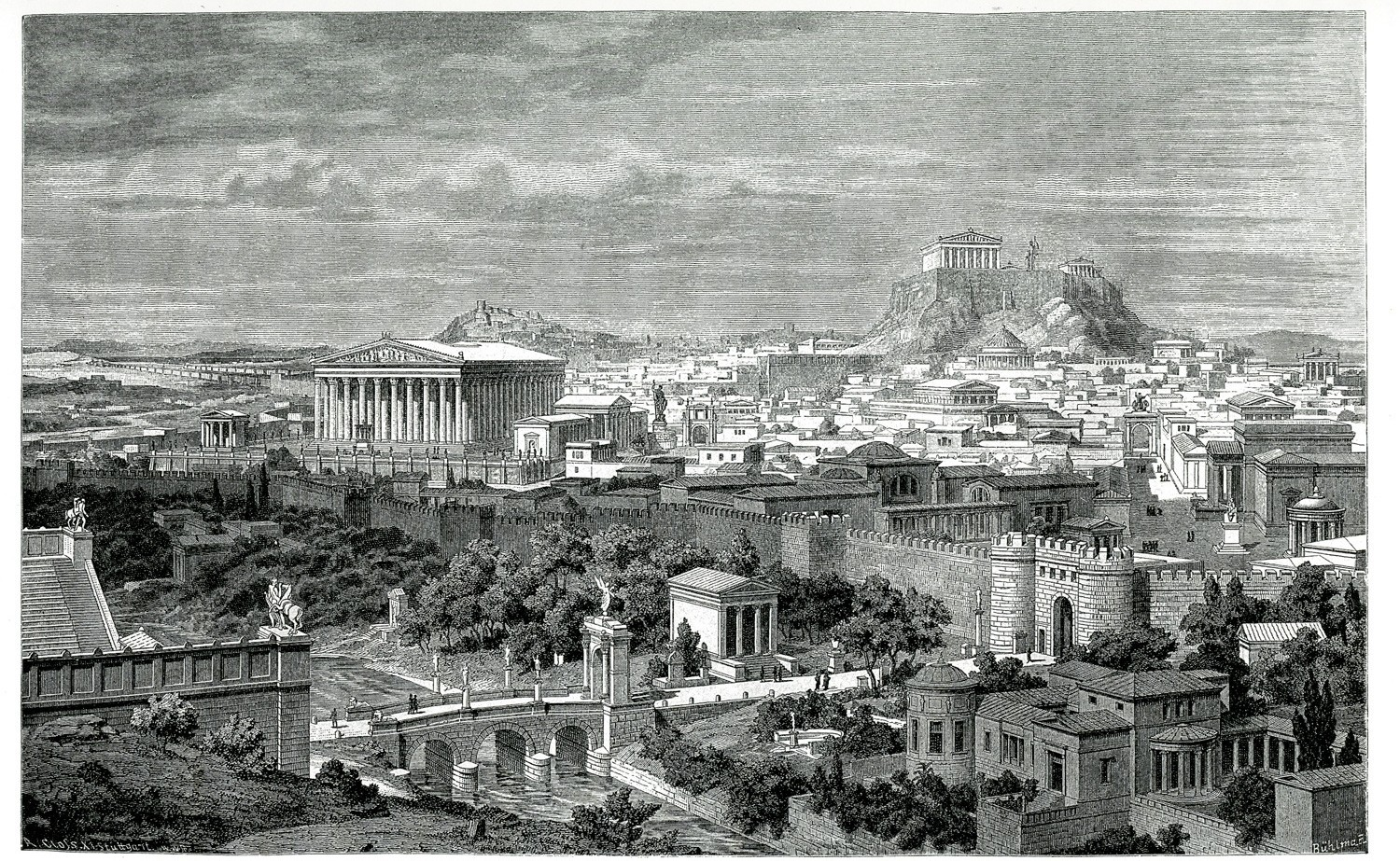 Ιάκωβος Φάλκε. Ελλάς, ο Βίος των Αρχαίων Ελλήνων. Κατά το γερμανικό του Ιακώβου Φάλκε, Ν. Γ. Πολίτης (μετ.), Αθήνα, Κάρολος Βίλμπεργκ, 1887